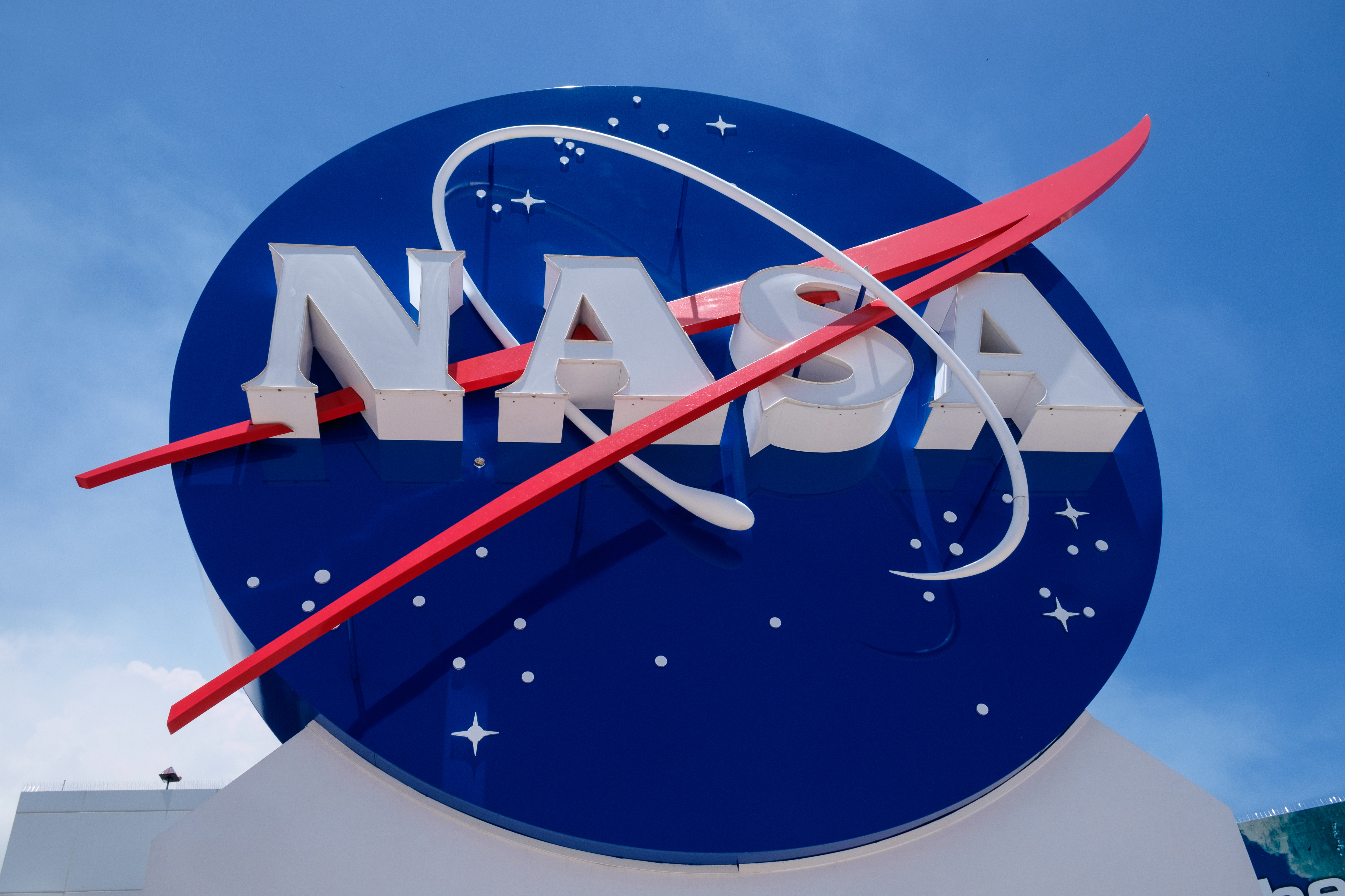 Håkan Dahlström Photography